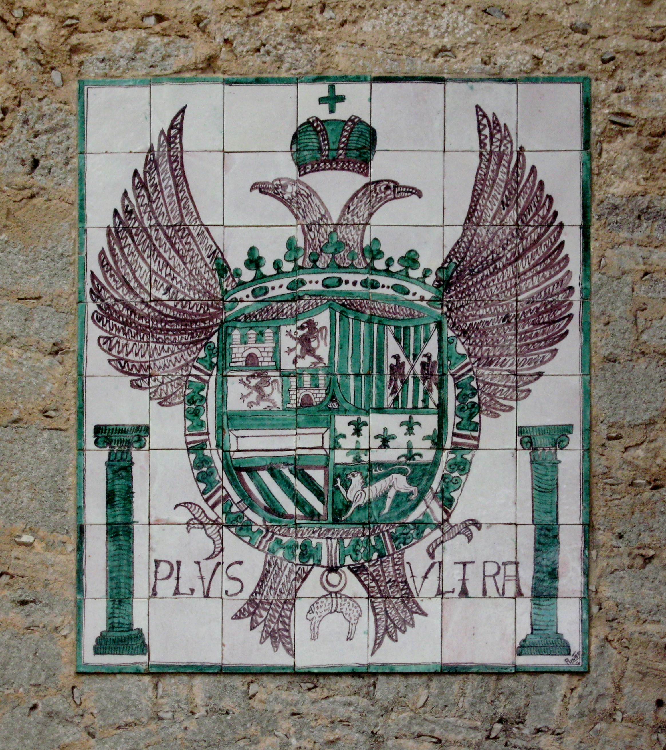 Wappen von Karl I., König von Spanien (als Karl V. Kaiser des Heiligen Römischen Reiches) mit dem Wahlspruch »PLVS VLTRA« (»weit hinaus«) an der Kirche Església de Sant Jaume in Alcúdia, Mallorca, Spanien